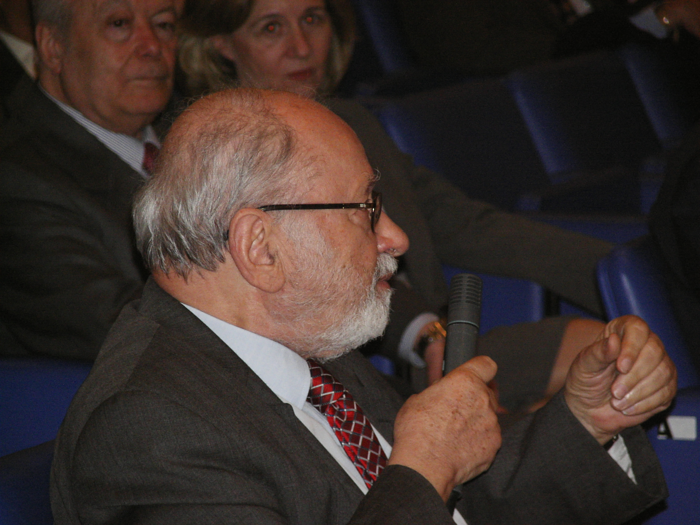 Leonidas Kyrkos